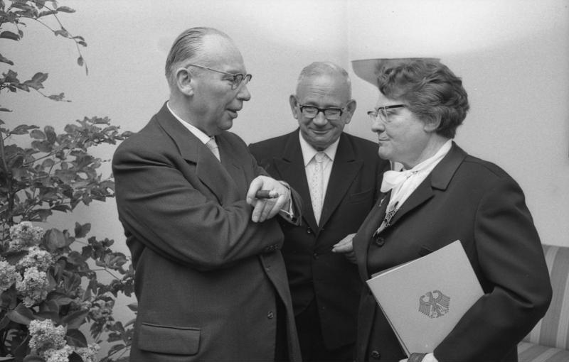 Empfang und Ordensverleihung an Bundestagsabg. durch Bundestagspräsident Dr. Gerstenmaier Bonn (v.l.n.r.: Müller-Ravensburg, Müller-Erbendorf, Frau Wessel)